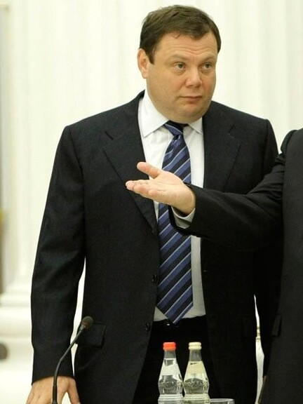 Михаил Фридман